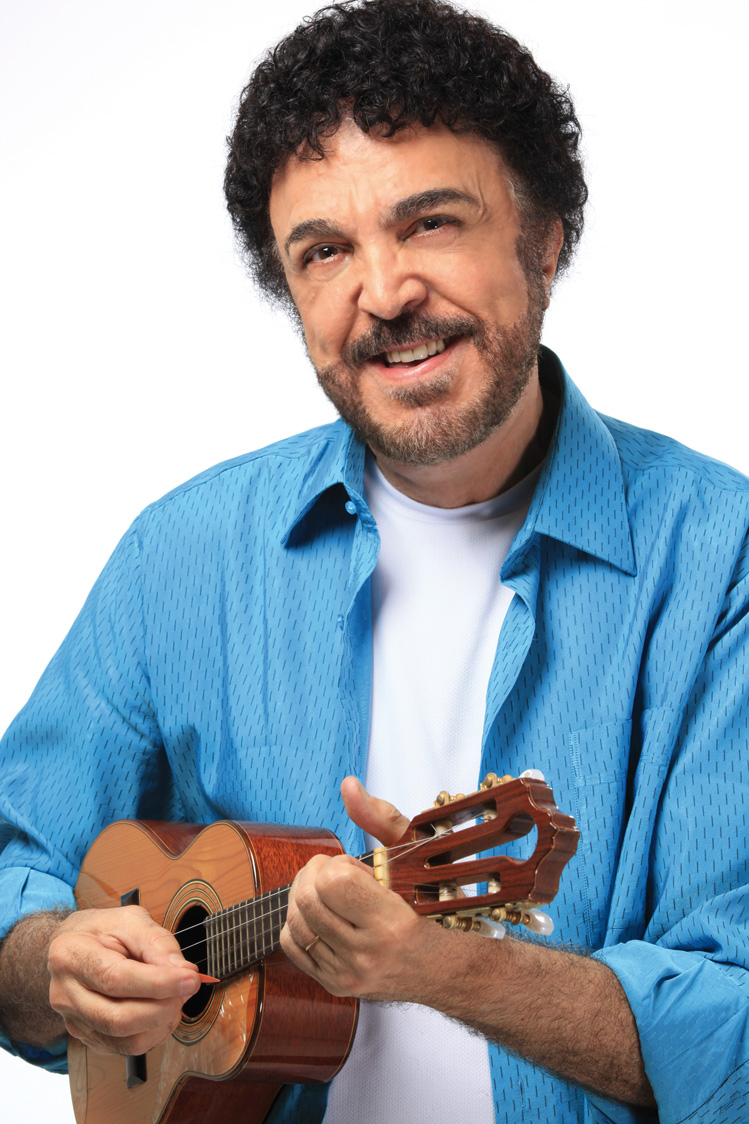 imagem do cantor e compositor brasileiro Luiz Ayrao